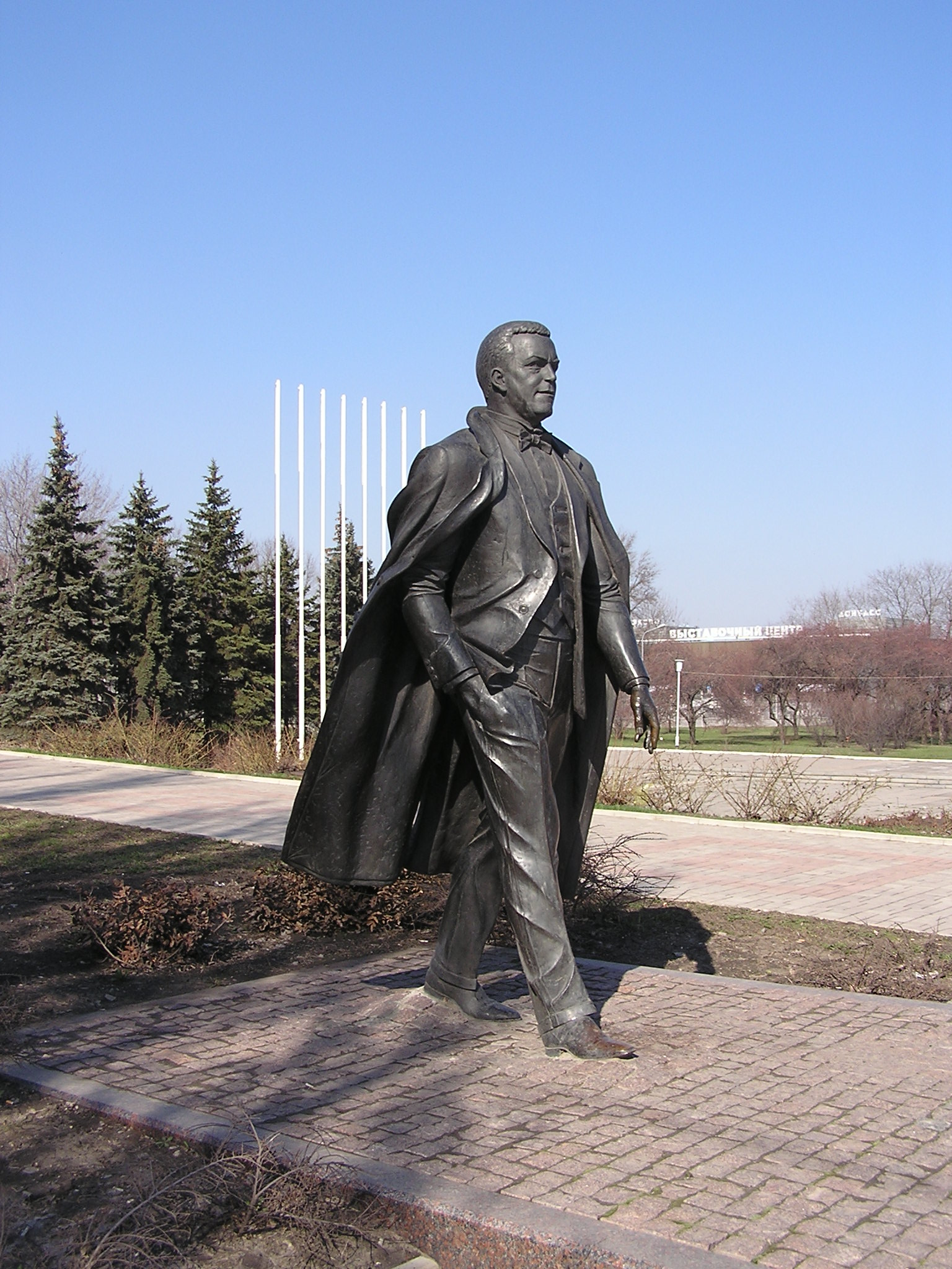 Памятник Кобзону